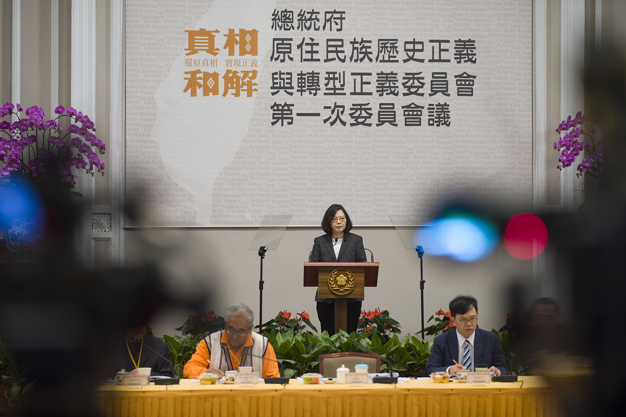 中華民國總統蔡英文主持總統府原住民族歷史正義與轉型正義委員會第一次委員會議。蔡英文致詞時說，即使原住民族委員會已經在體制內盡了許多努力，問題卻不一定能一次解決，因此需要原轉會的對話機制，用集體的智慧來面對挑戰。